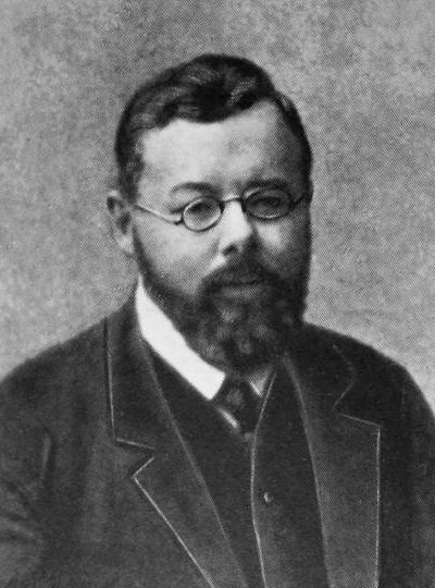 Портрет Михаила Ивановича Туган-Барановского, русского экономиста и политического деятеля